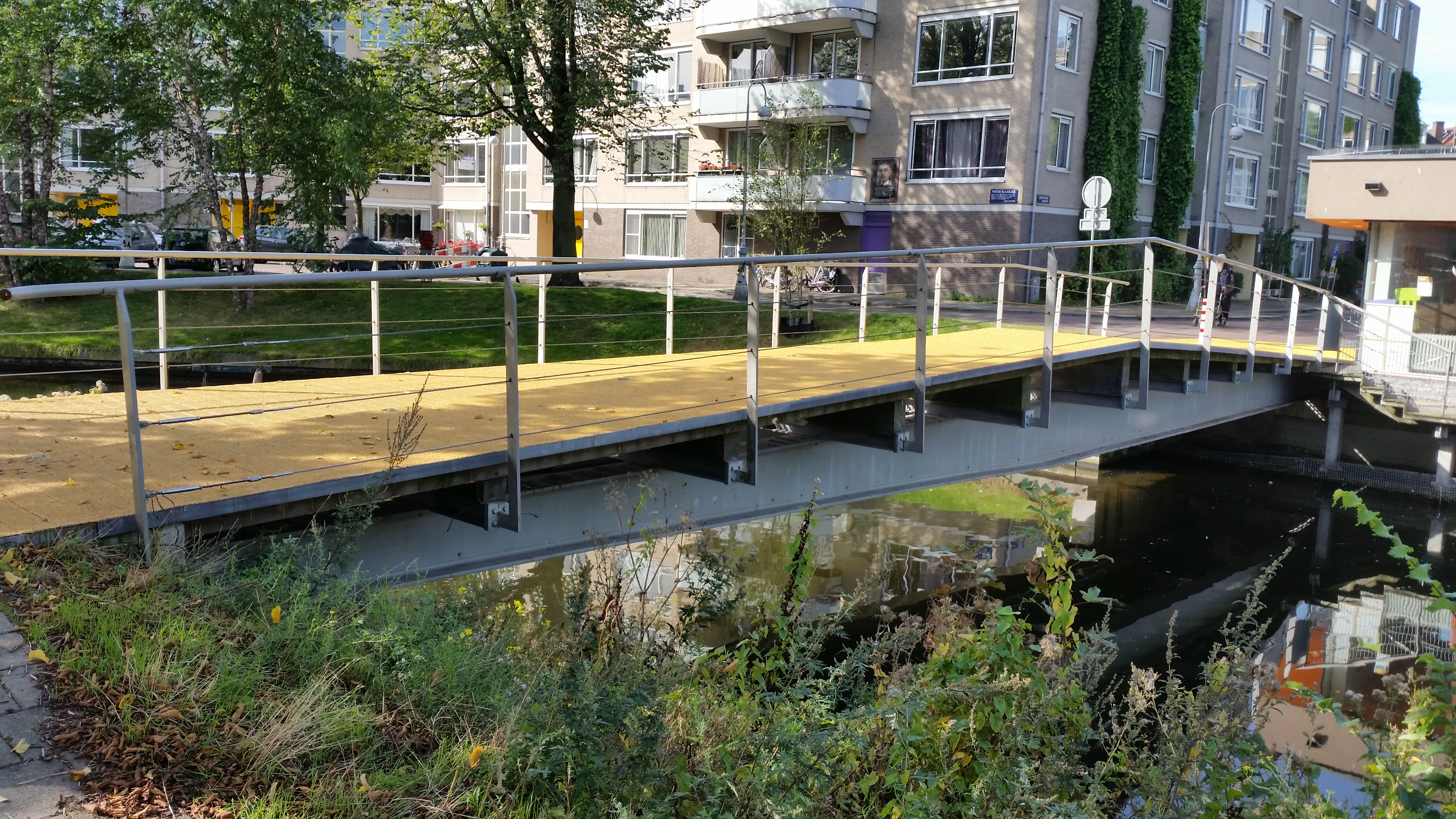 Zijaanzicht op Brug 1909